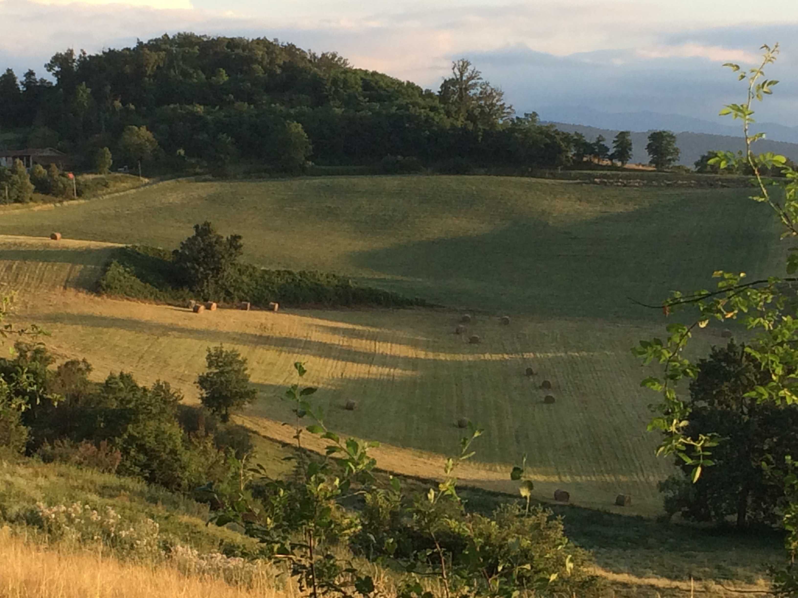 Rive gauche de l'Ariège, les coteaux du Terrefort, une zone d'élevage et de polyculture à l'habitat dispersé.